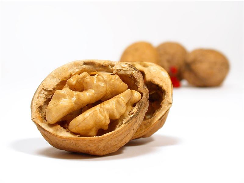 Walnuss